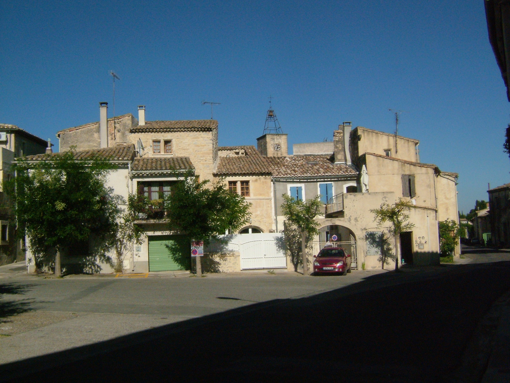 The village centre 30111 Congénies.